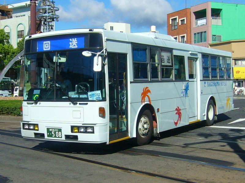 登録番号 鹿児島200か・508 鹿児島交通所属 一般路線用車両 元・西武バス 2006年7月29日 鹿児島駅前にて撮影